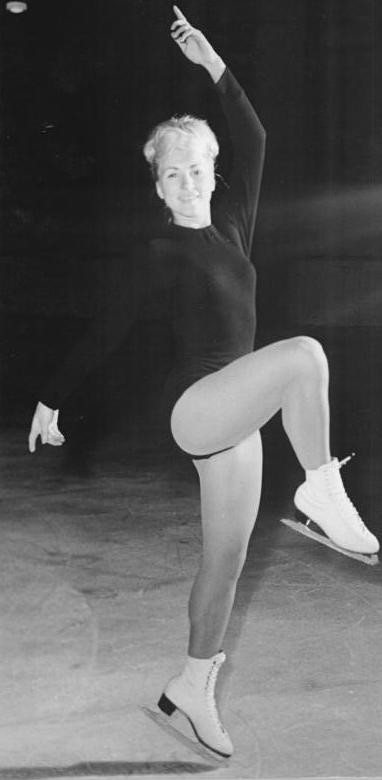 Jana Mrazkova Zentralbild Studré 14.11.1964 Berlin: Internationaler Verbandspokal des DELV Jana Mrazkova (CSSR), die Zehnte der letzten Europameisterschaften, liegt bei den Damen nach dem Pflichtlaufen auf Platz 2.